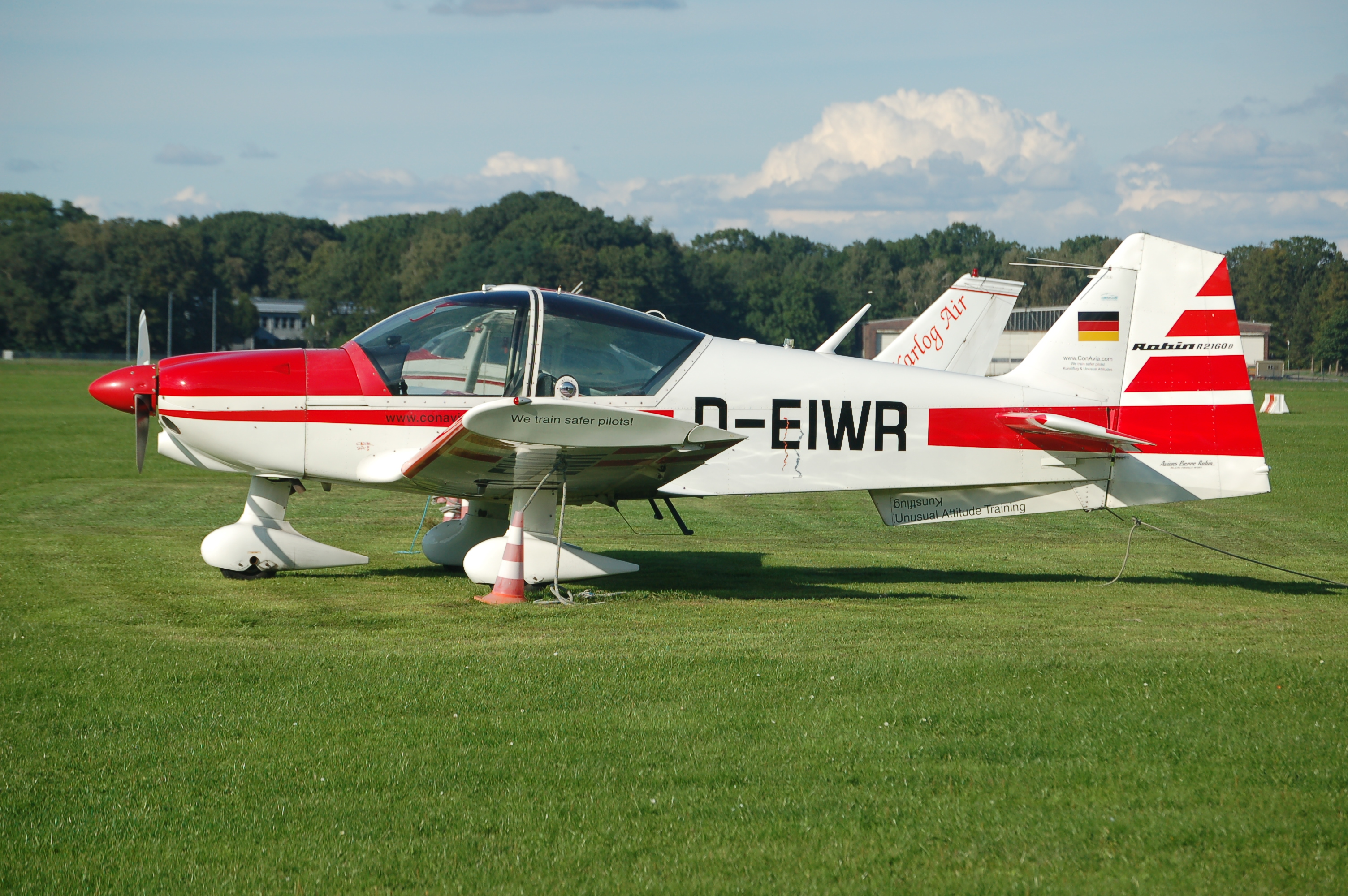 Robin R.2160 (D-EIWR) auf dem Flugplatz Uetersen